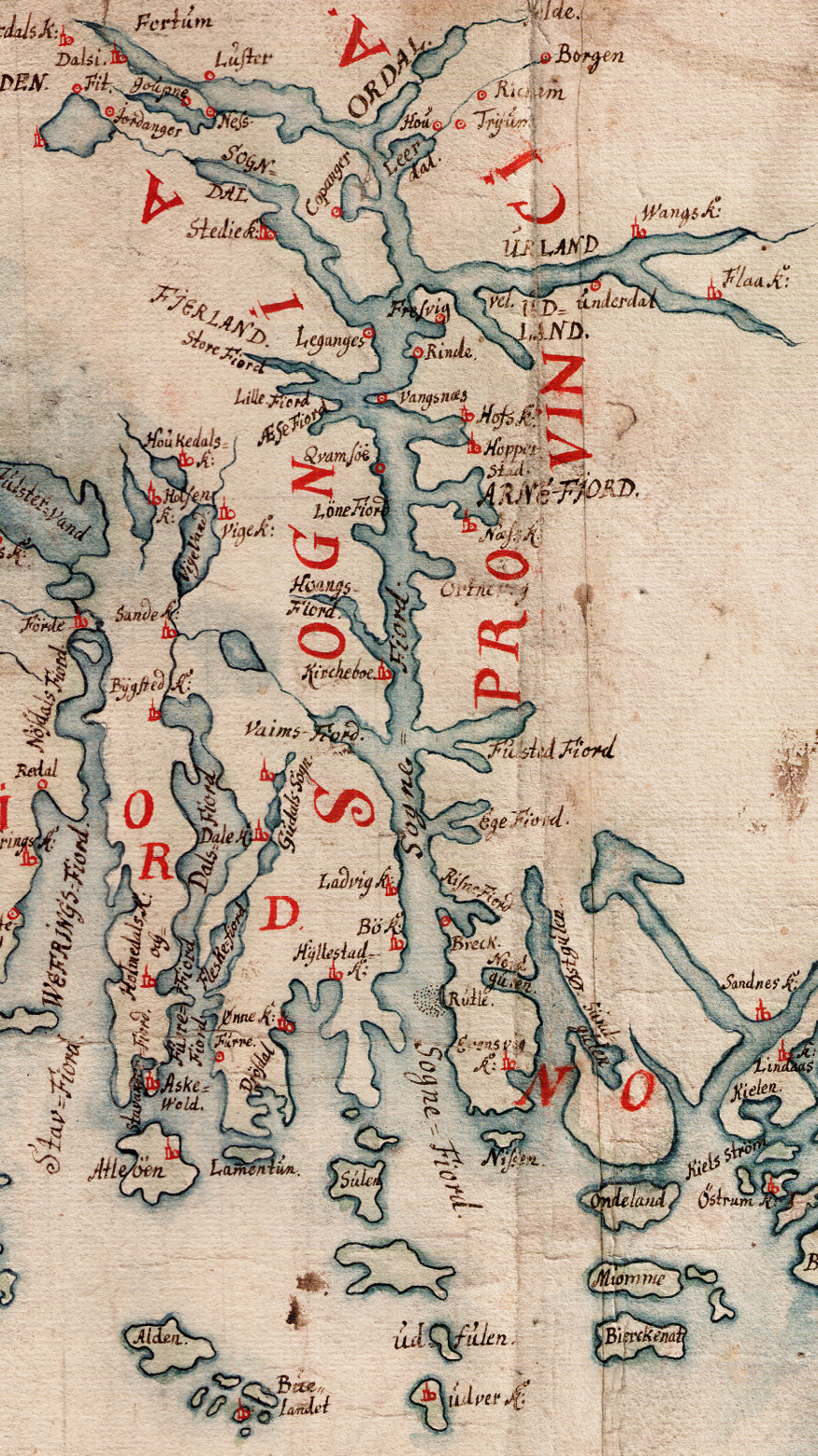 Sjøkart fra 1610 over kysten fra Karmøy til Geirangerfjorden. Håndtegnet i ukjent målestokk. Original kartstørrelse ca 74 cm x 31 cm. Et eksemplar befinner seg hos Statens kartverk Sjø i Stavanger.